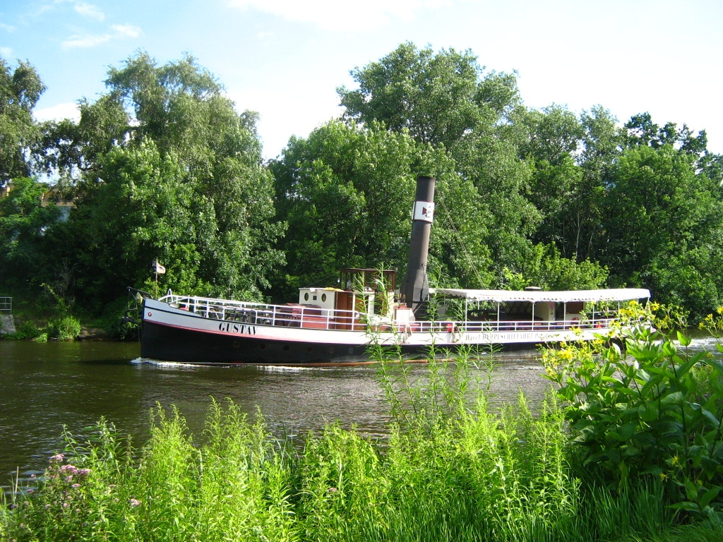 Der Dampfer „Gustav“ auf der „Neuen Fahrt“ (Havel) in Potsdam